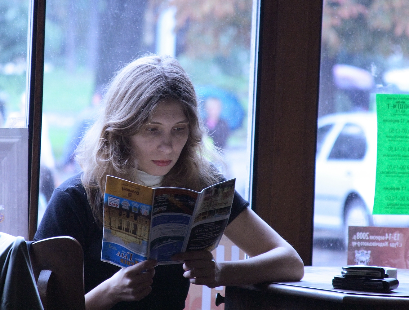 Марина Соколян, письменниця та сценаристка